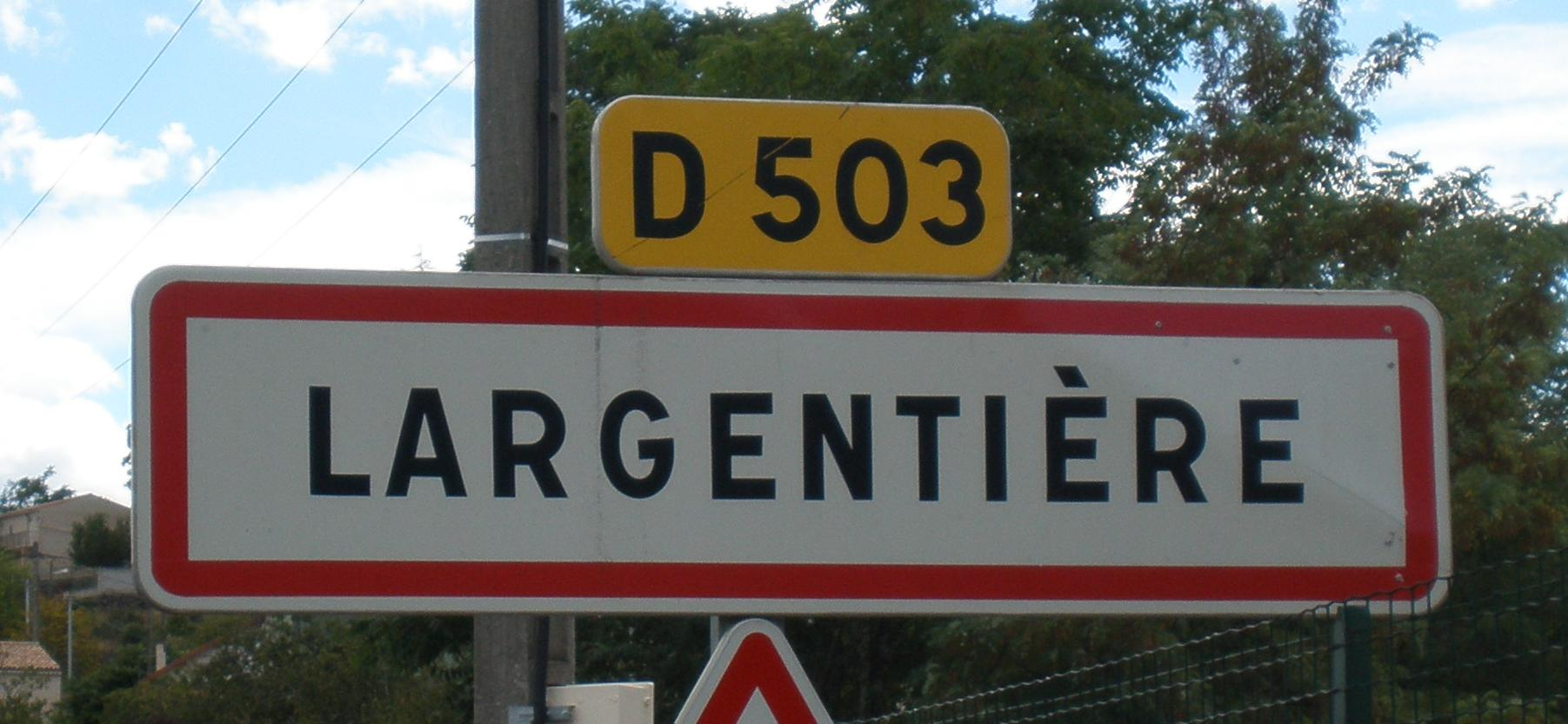 panneau d'entrée de Largentière (Ardèche)